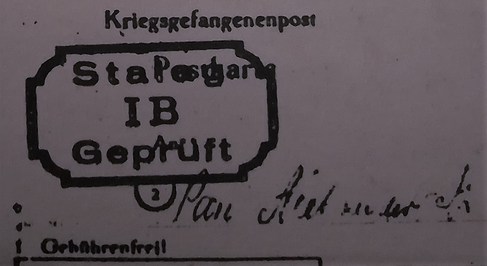 Stempel niemieckiego nazistowskiego stalagu IB.